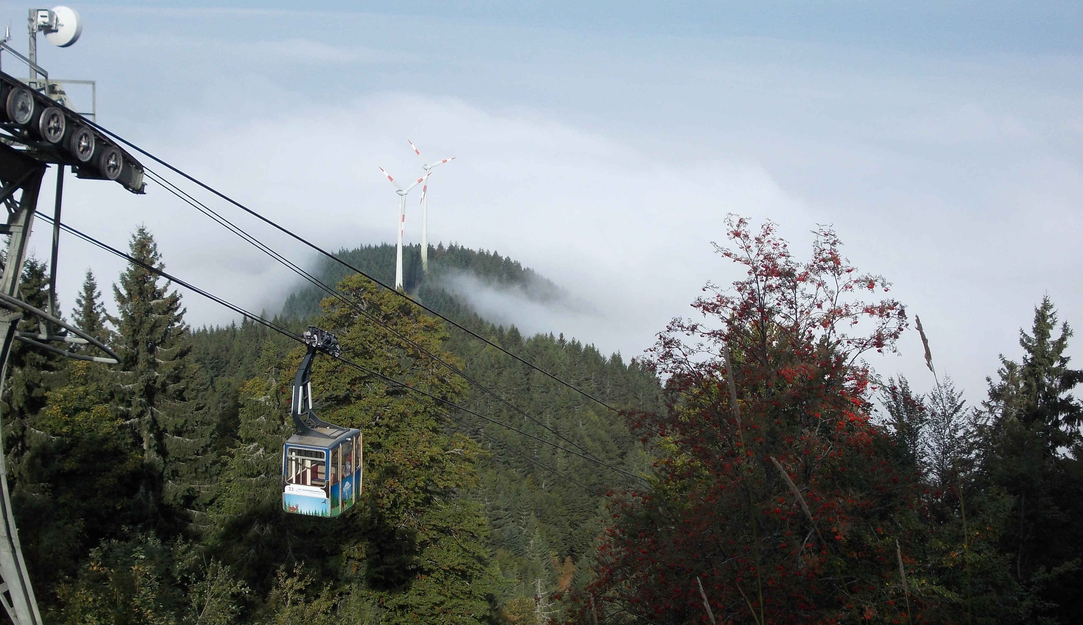 Freiburg i. Br. - Schauinslandbahn vor den Windrädern auf der Holzschlägermatte